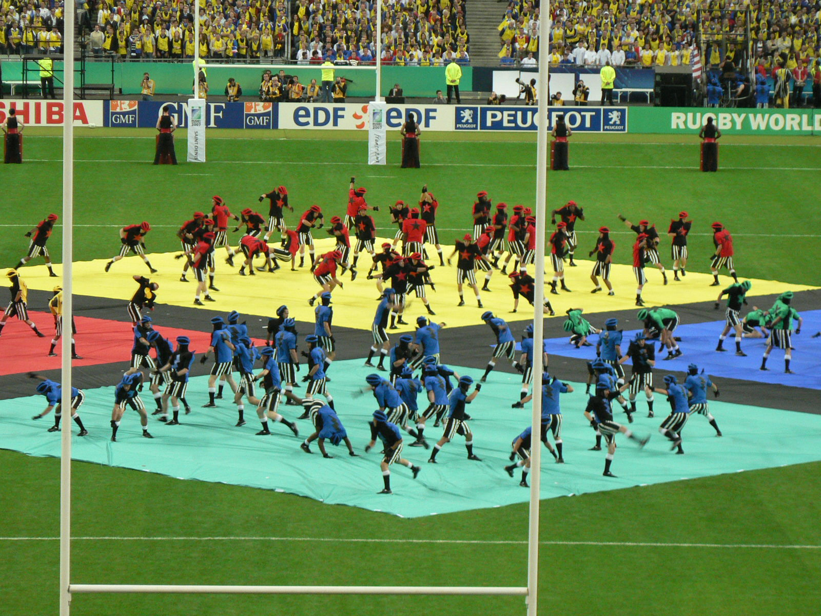 Cérémonie d'ouverture - Coupe du Monde de Rugby 2007